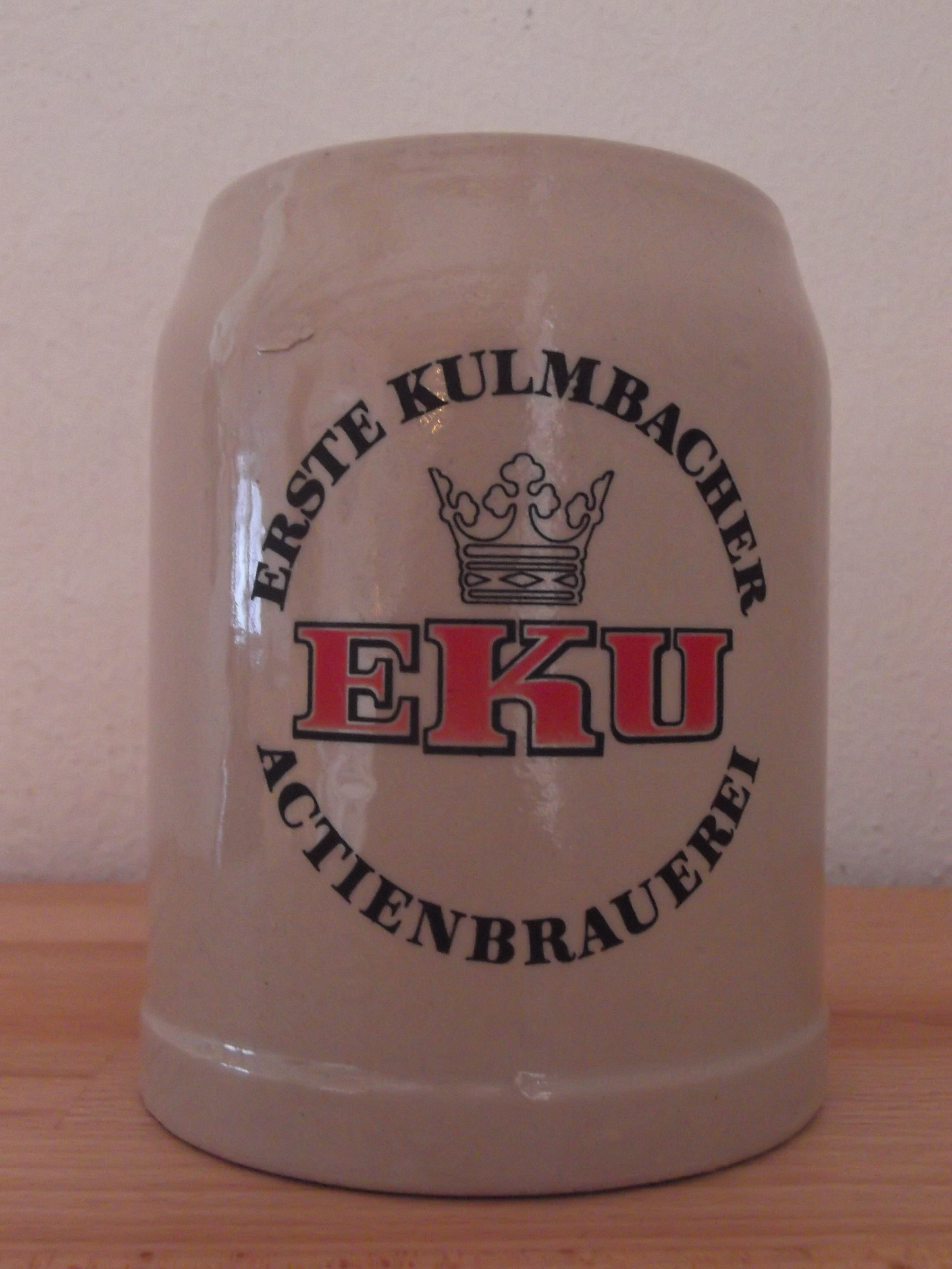 0,5-L-Tonkrug der Ersen Kulmbacher Actienbrauerei (EKU)